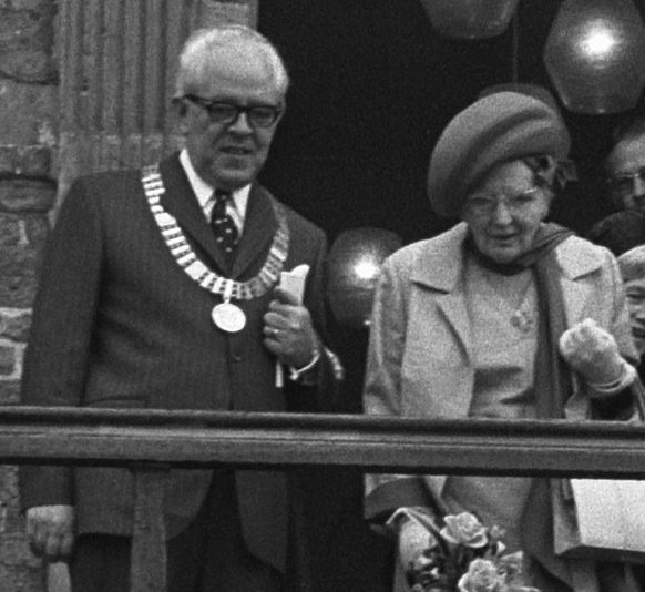 Koningin Juliana o.a. in gezelschap van de burgemeester van IJsselstein, J.G.C.J. Timmermans, tijdens bezichting van de IJsselsteinse zeskampploeg